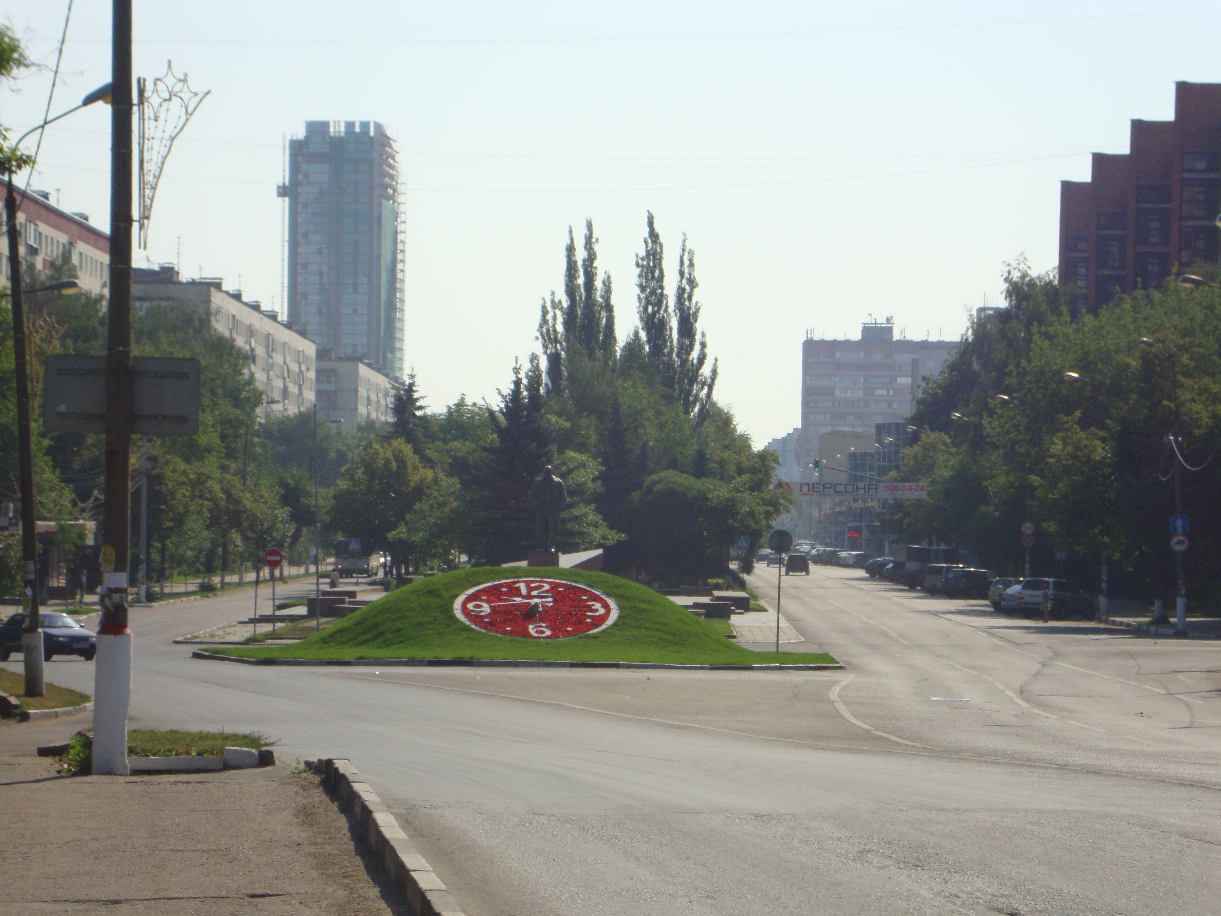 Проспект Королева